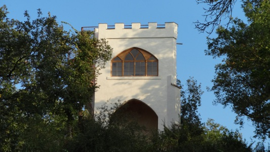 Die Wallwitzburg in Dessau von der Parkseite aus gesehen, nach der Rekonstruktion durch den Wallwitzburg Dessau e. V., 2011. Bestimmend ist das Spitzbogenfenster.